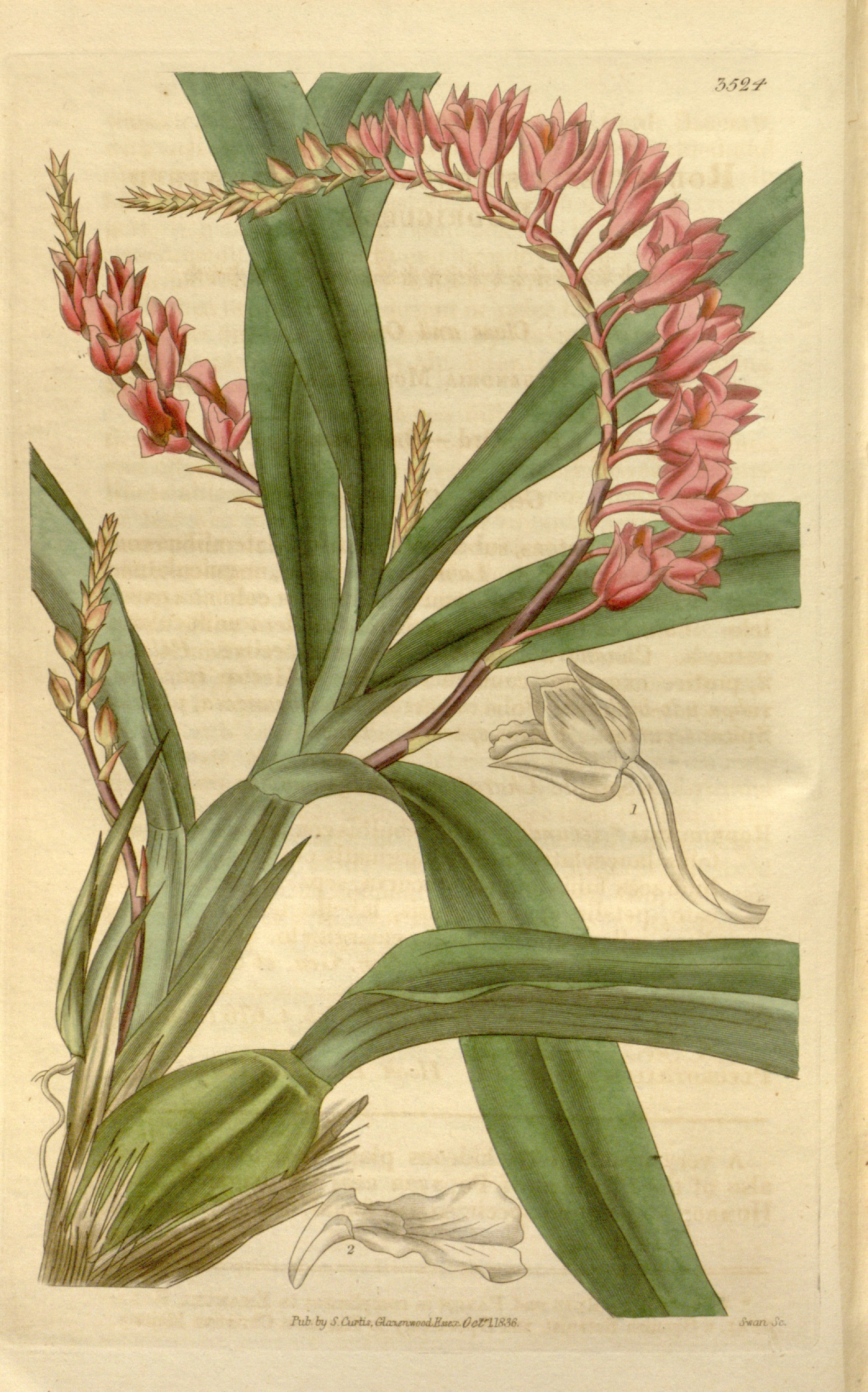 Illustration of Rodriguezia lanceolata (as syn. Rodriguezia secunda)